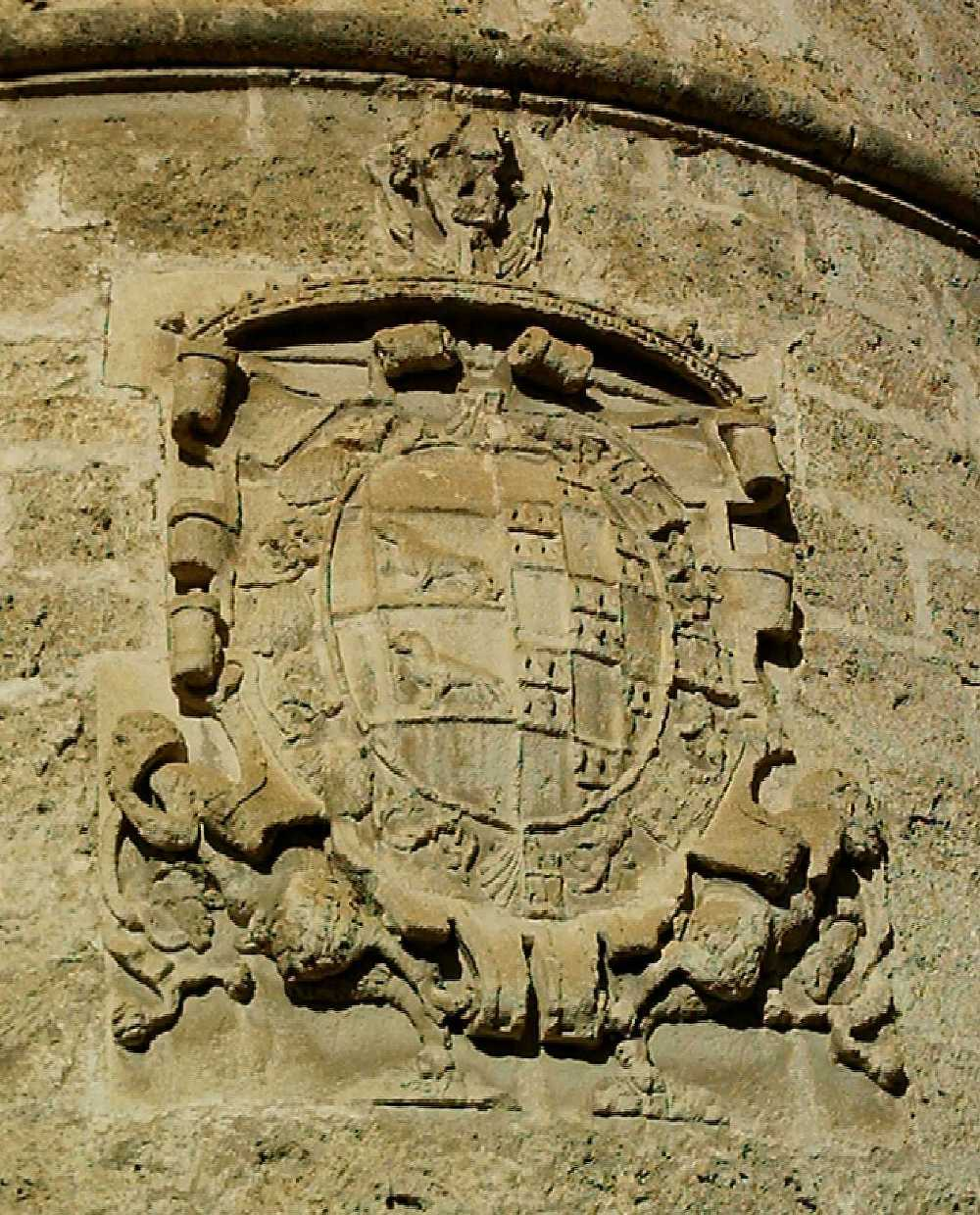 Escudo con las armas de los duques de Maqueda y Frias labrado situado en la torre de convento de los agustinos de Huécija (Almería - España)